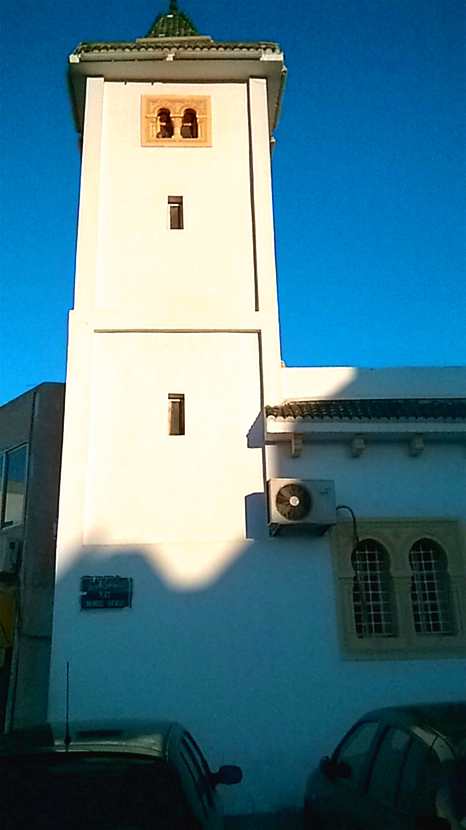 Bab El Khadra, Bab Souika , Tunis باب الخضراء , باب سويقة ، تونس